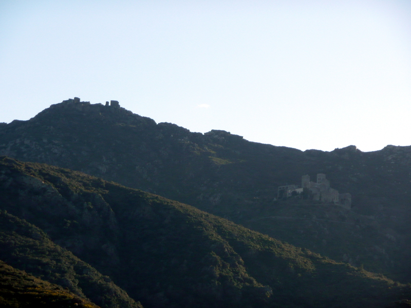 el monestir de Sant Pere de Rodes i el castell de Verdera des de la Vall de Santa Creu, el Port de la Selva (Alt Empordà)